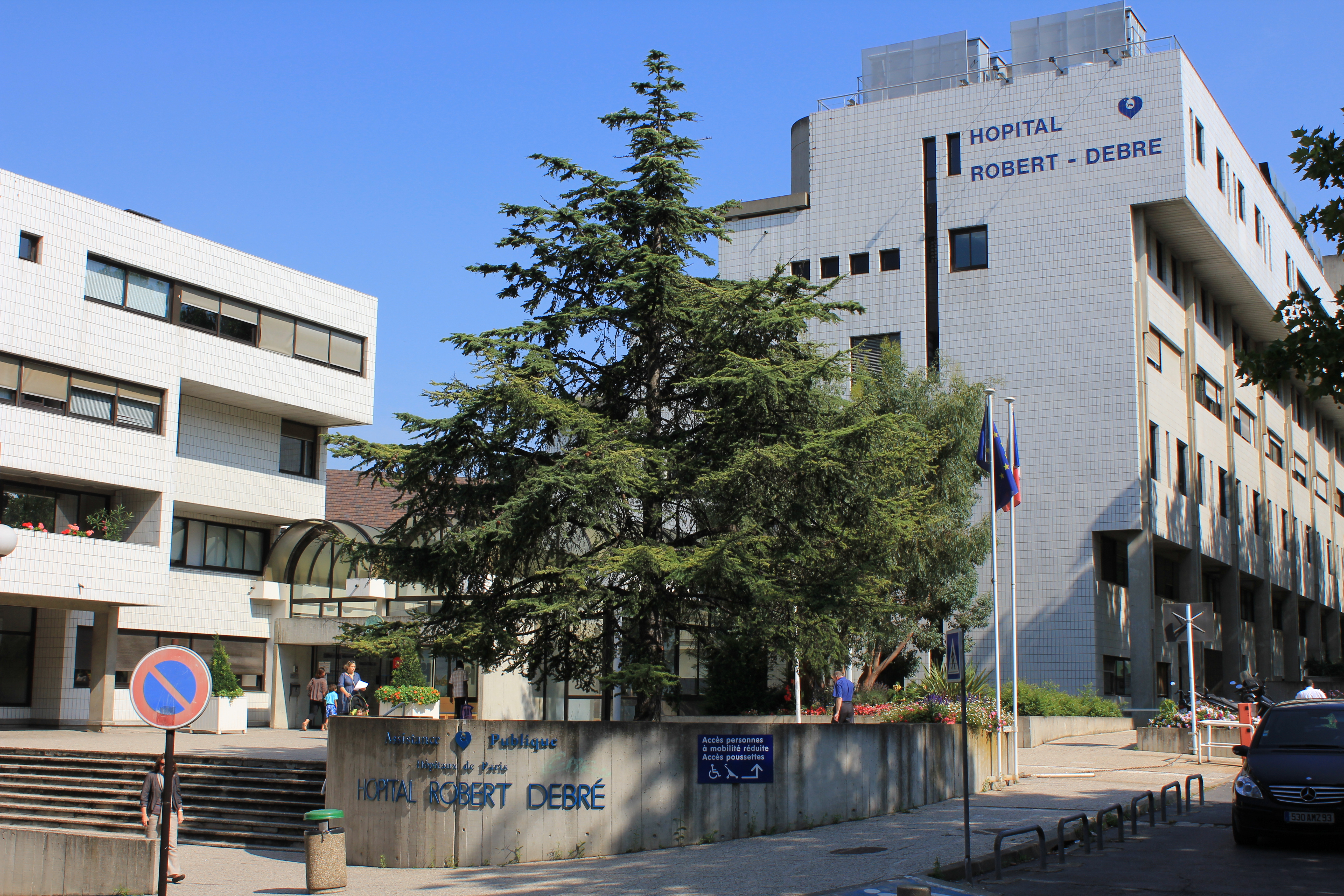 Hôpital Robert-Debré, porte des Lilas, Paris